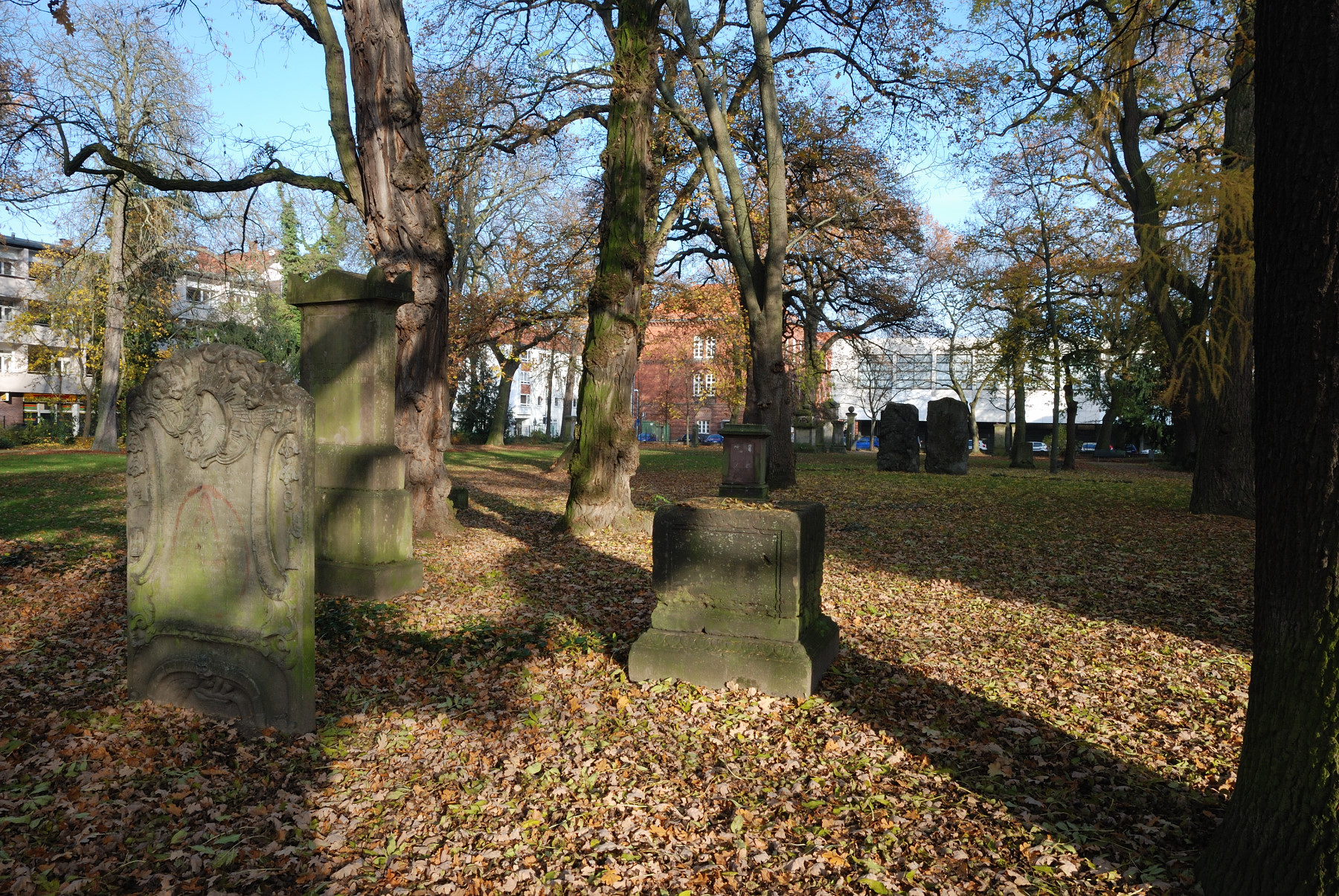 Braunschweig, Martini-Friedhof, Blick von Westen in Richtung Goslarsche Straße